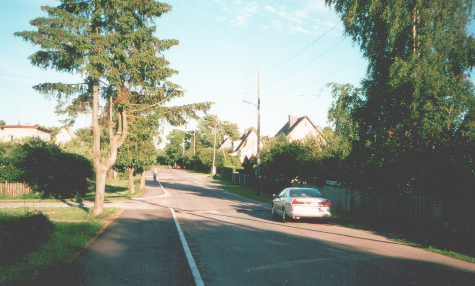 Street in Saue (Estonia)